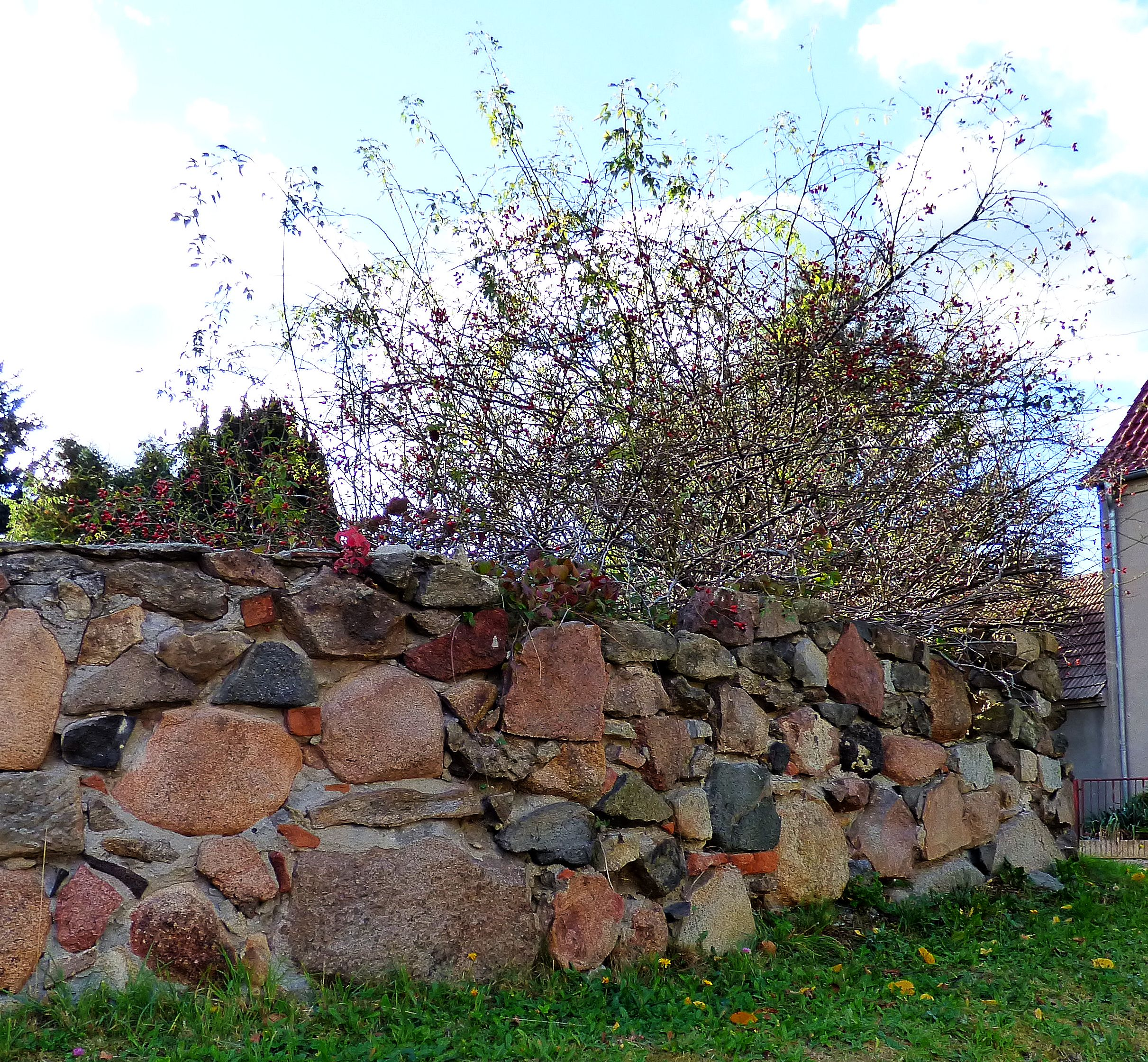 Friedhofsmauer an der Dorfkirche Dreska